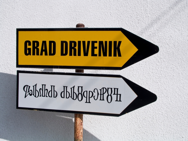 Putokaz za Grad Drivenik u Driveniku